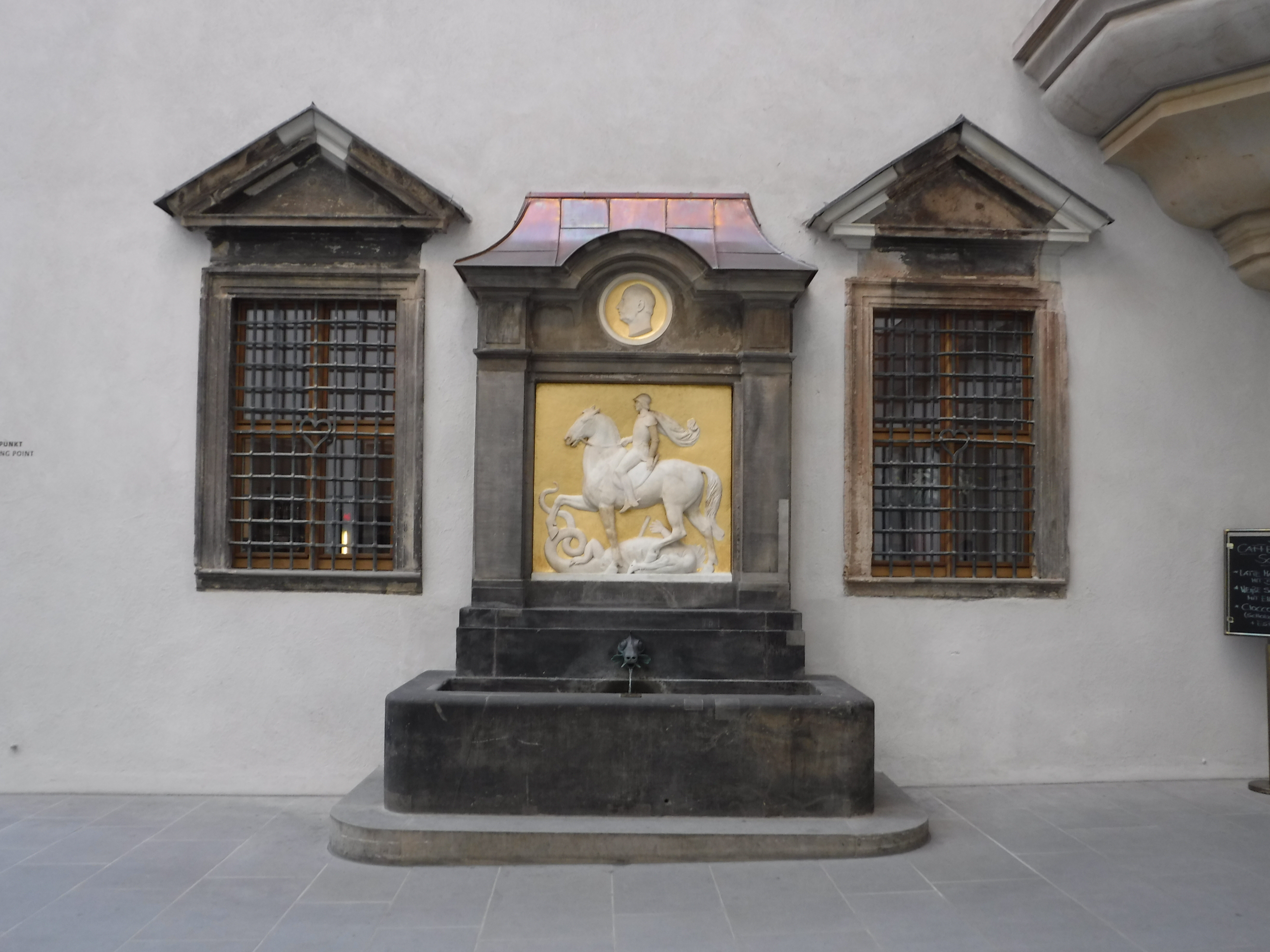 Georgsbrunnen (Dresden) - Gesamtansicht